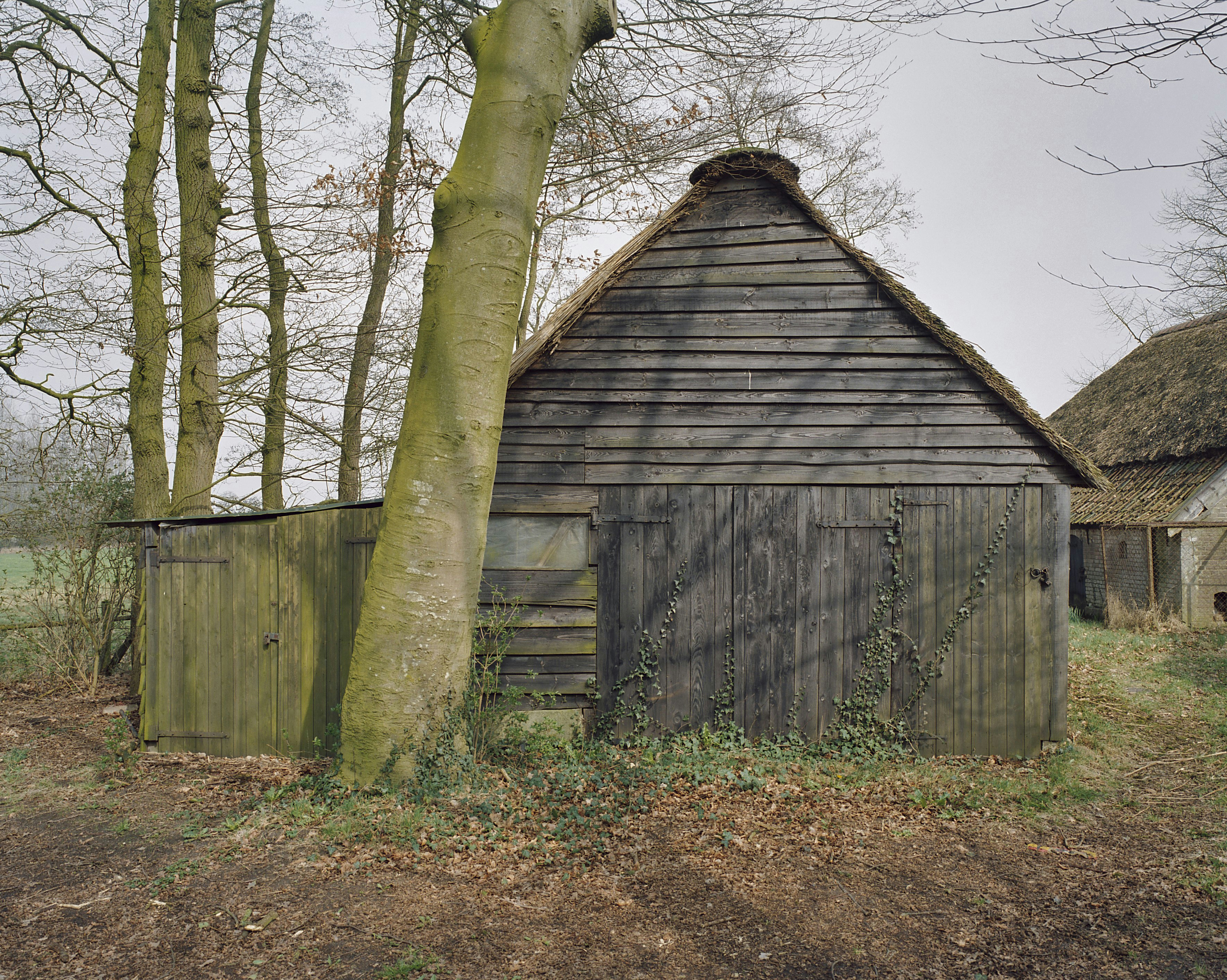 Boerderijcomplex: Houten schuur, overzicht